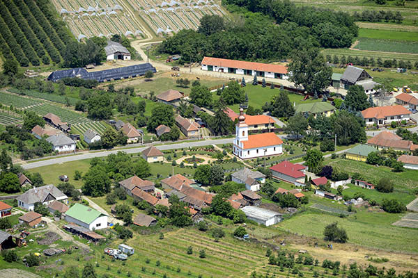 Légi fotó